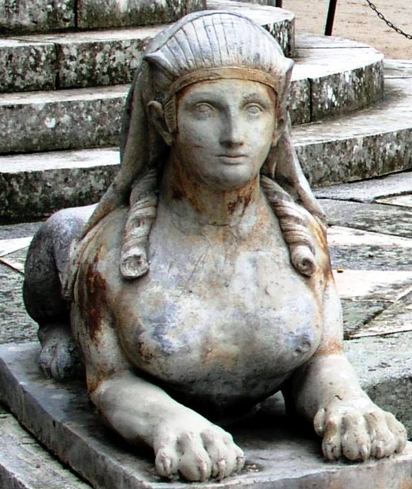 Jardín El Capricho, Madrid, Spain. Sfinxs at Exedra y Plaza de los Emperadores.